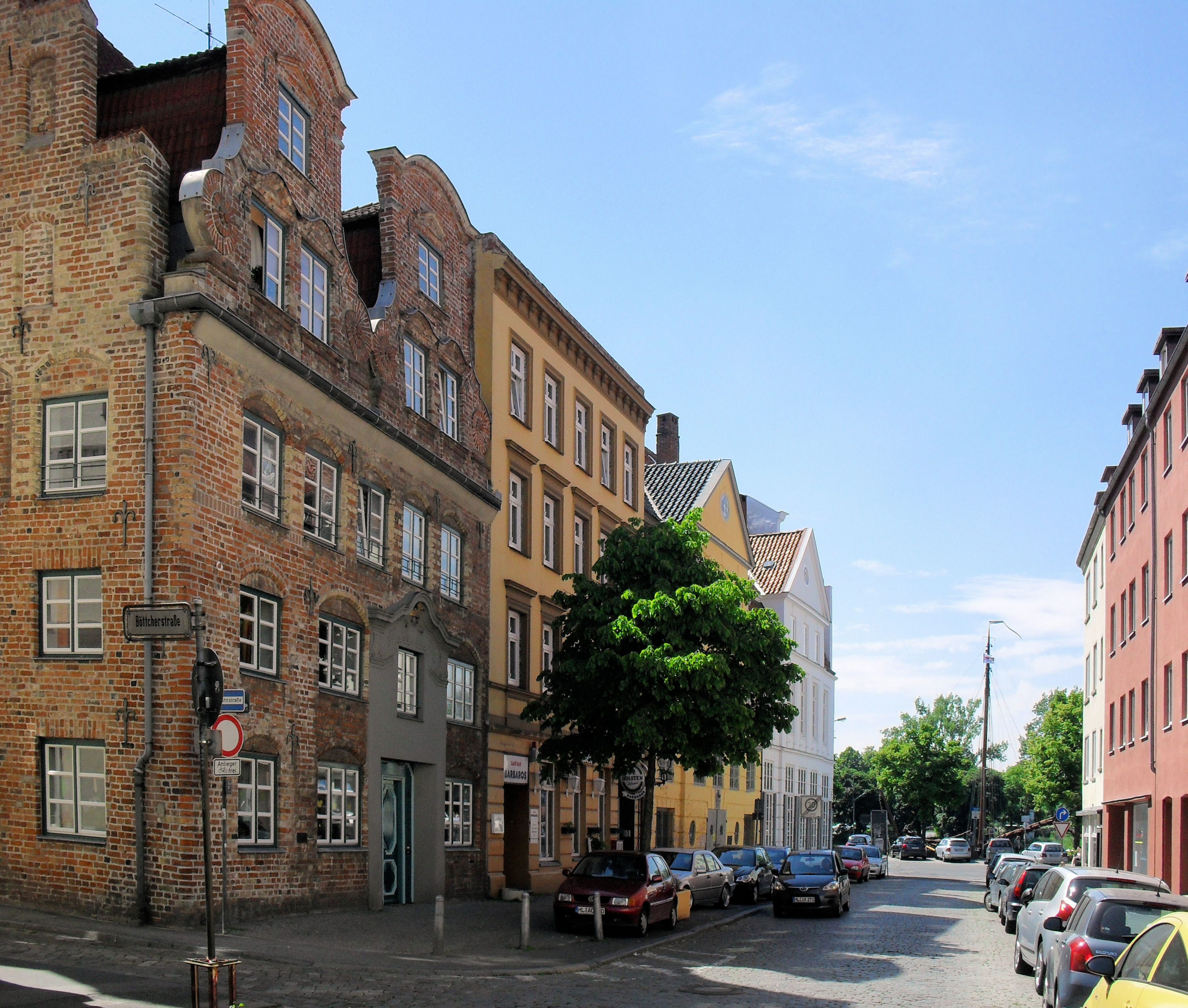 Die Fischergrube in Lübeck